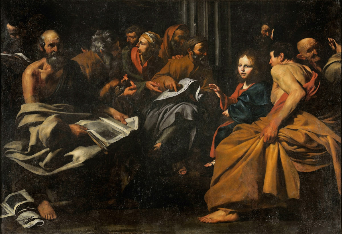 Gesù tra i dottori